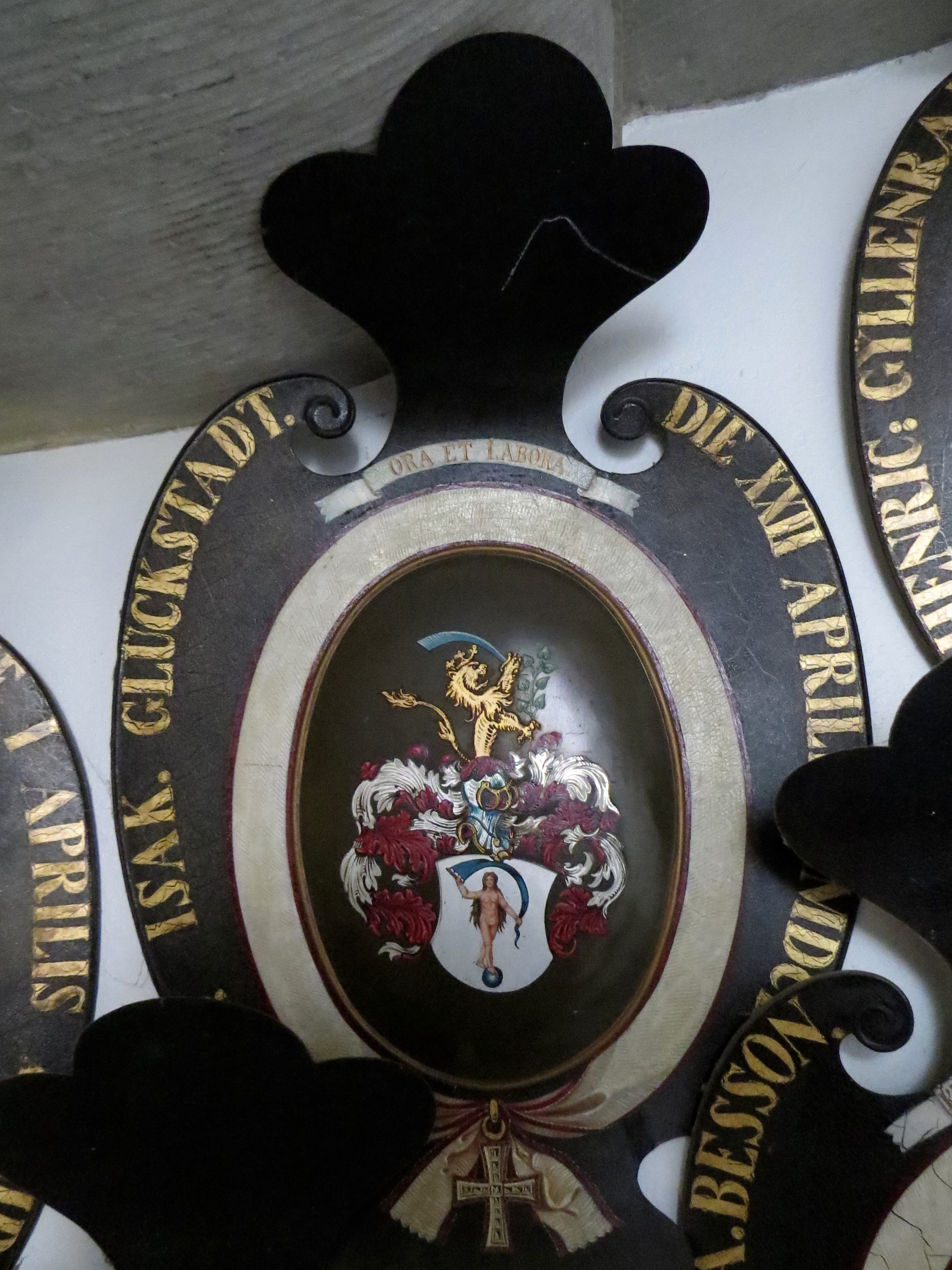 Isak. Glückstadt (våben), Frederiksborg Slot, Sjælland